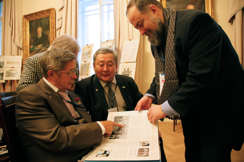 14 Съезд Русского географического общества. Савиных, Тулохонов и Колотило обсуждают подготовленную к изданию книгу "Русское географическое общество. 165 лет служения Отечеству".